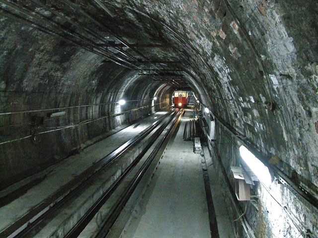 Istambul Tunel